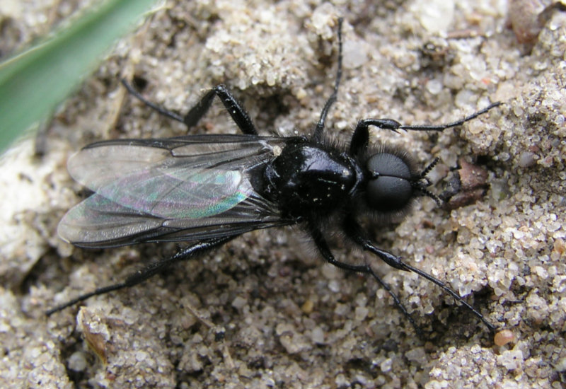 gewone rouwvlieg , Bibio marci. Eigen werk Evanherk 9 jun 2005 21:05 (CEST) eigen foto E van Herk roggebotzand, flevoland 5/5/2005